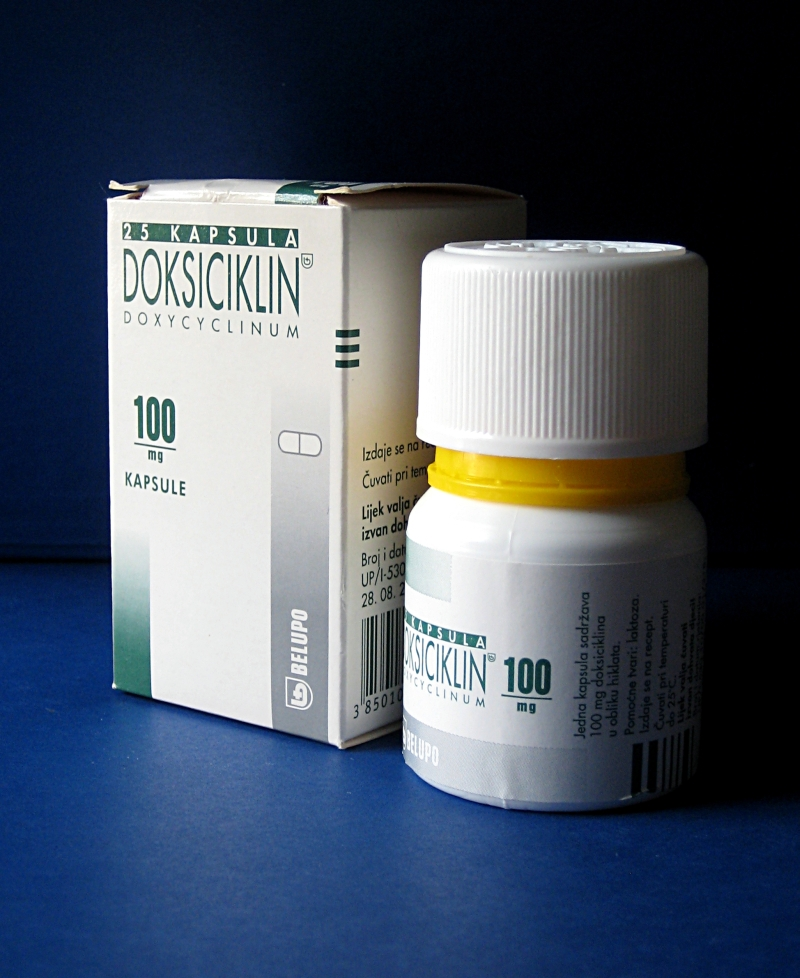 Fotografija lijeka Doksicilin